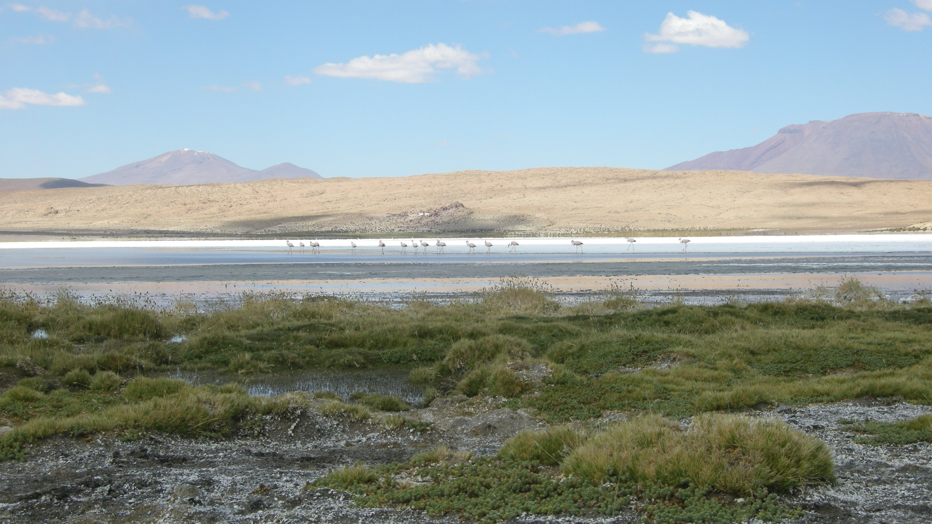 Flamingoes